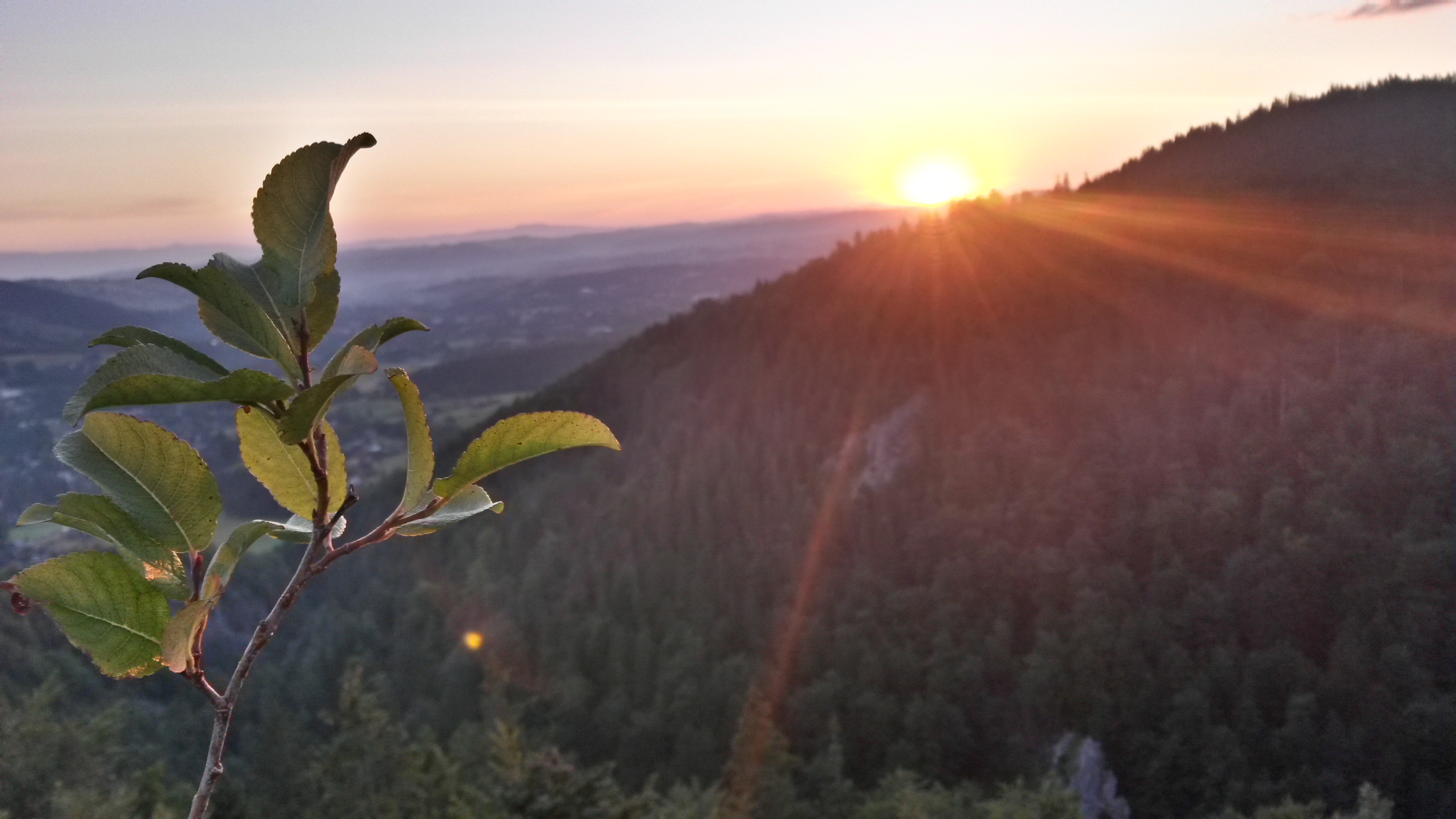 Wschód Słońca z Jasiowych Turnii